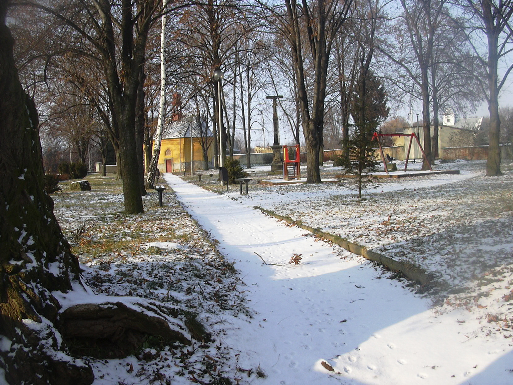 Bývalý hřbitov Za branou, Ivanovice na Hané, Česká republika